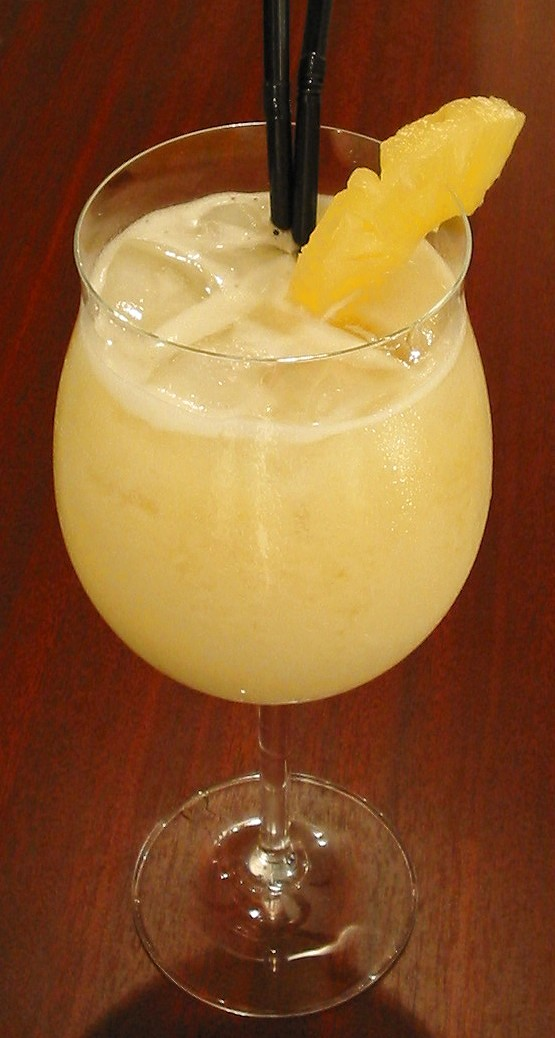 Beschreibung: Piña Colada Quelle: Fotographiert 2004 Fotograf oder Zeichner: Mario Trefz Lizenzstatus: Public Domain